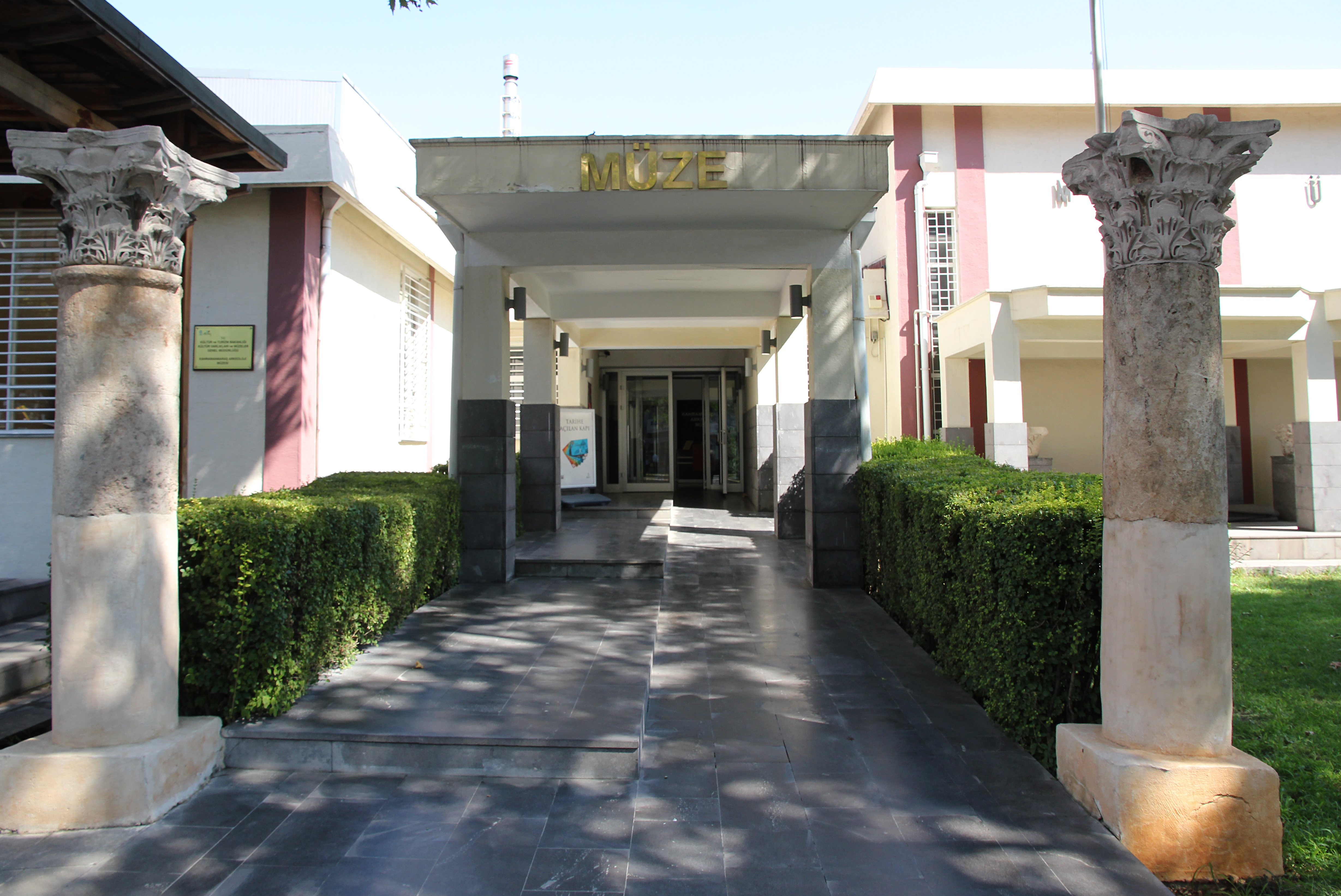 Archäologisches Museum Kahramanmaraş, Türkei, Eingang